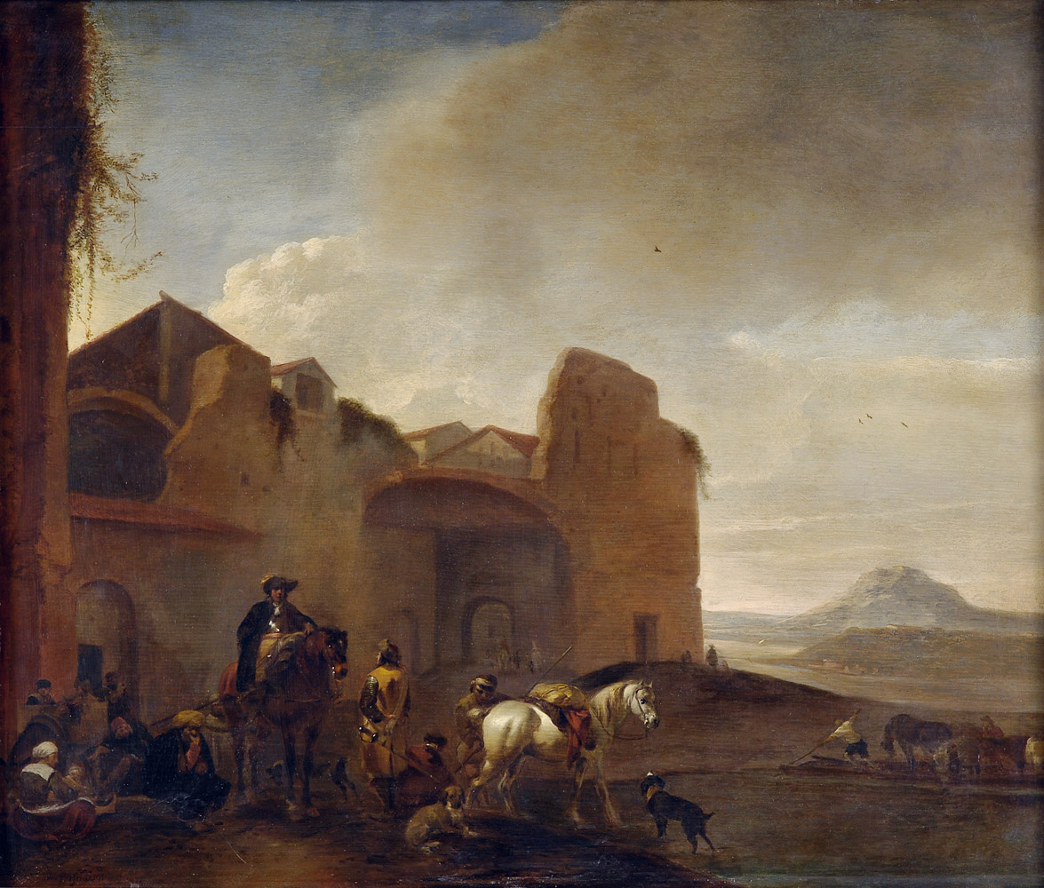 Reges Treiben vor dem Stadttor.